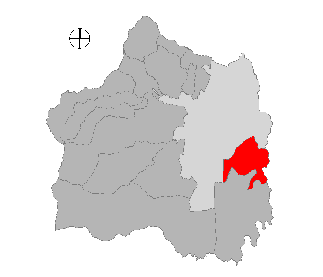 Corregimiento de Cali, Colombia